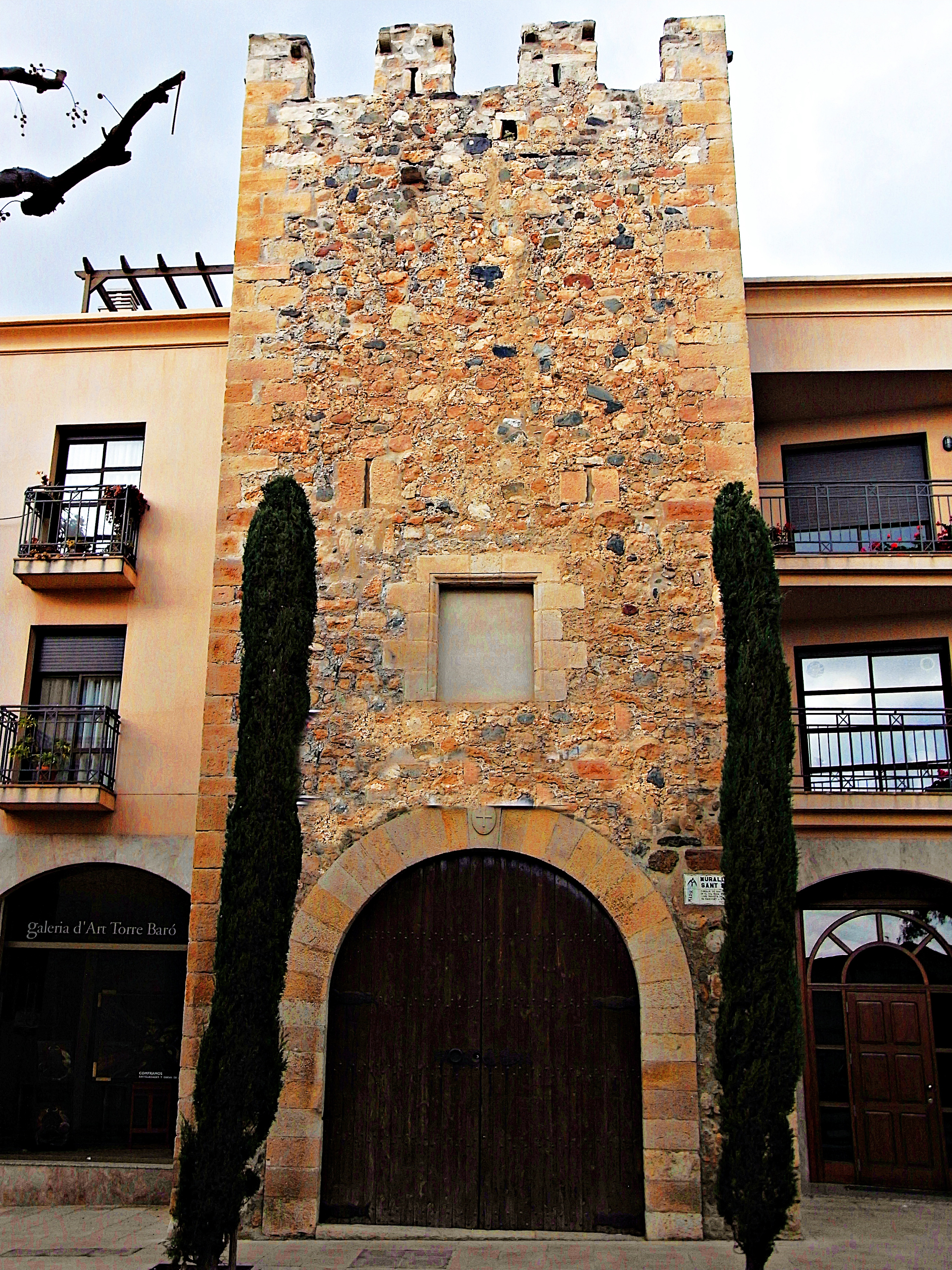 Torres de la muralla i muralla de Sant Rafel (La Selva del Camp)